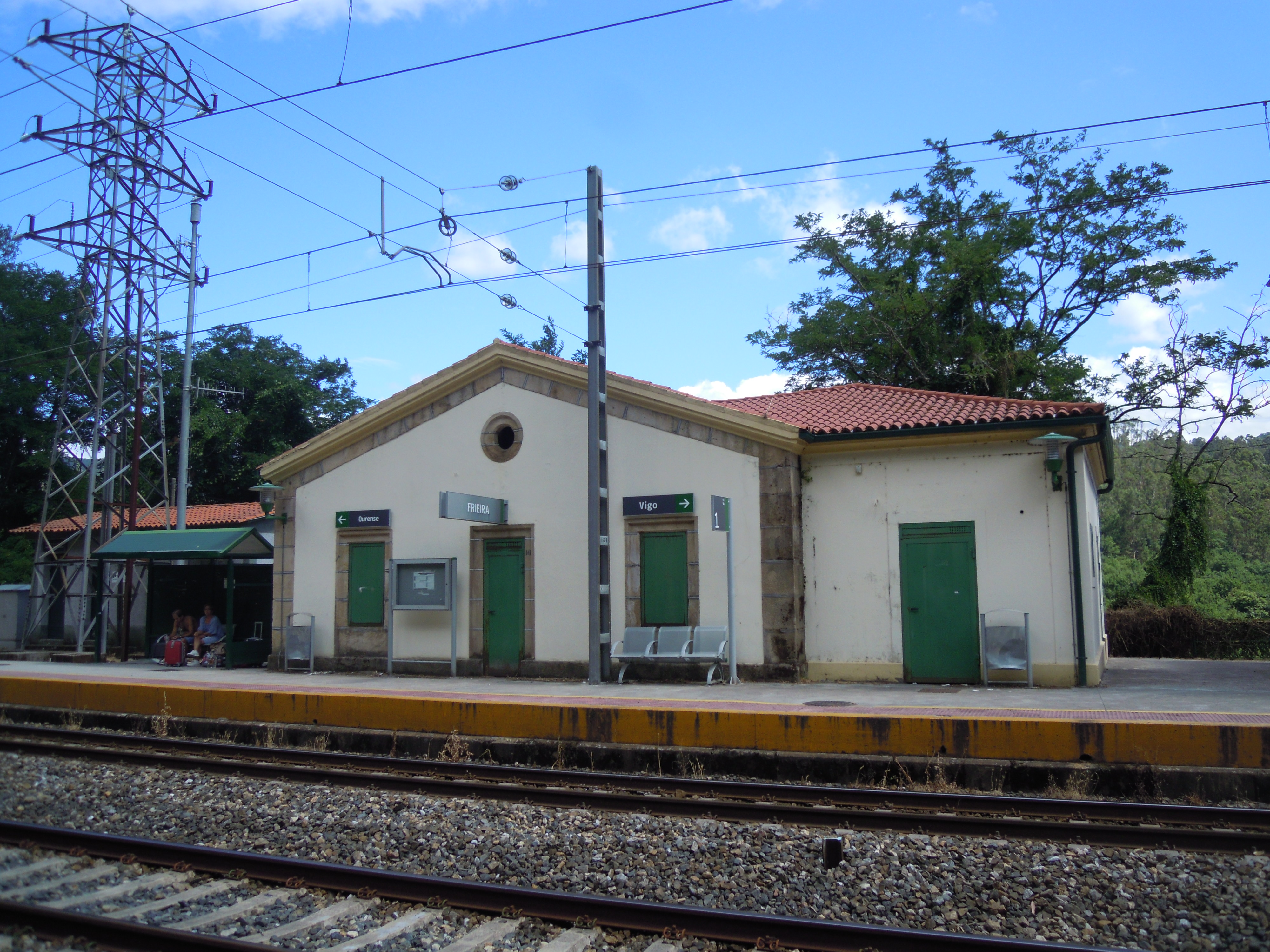 Estación de Frieira.